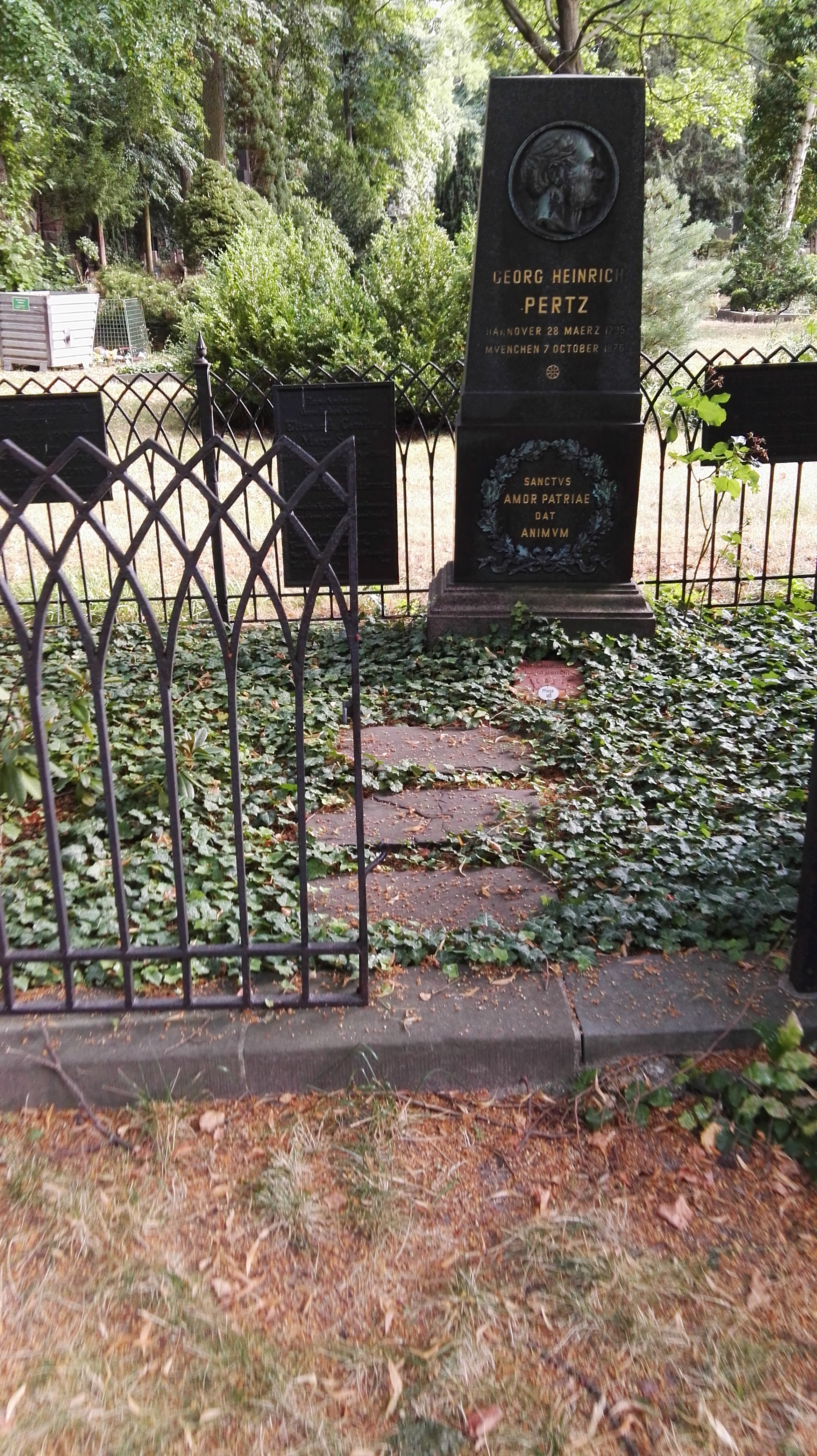 Ehrengrab für Georg Heinrich Pertz auf dem Dreifaltigkeitskirchhof II in Berlin